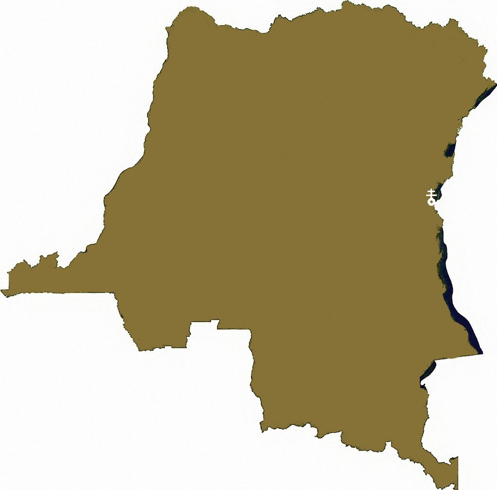 kaart congo